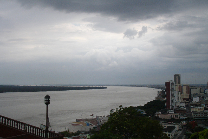 Río Guayas.